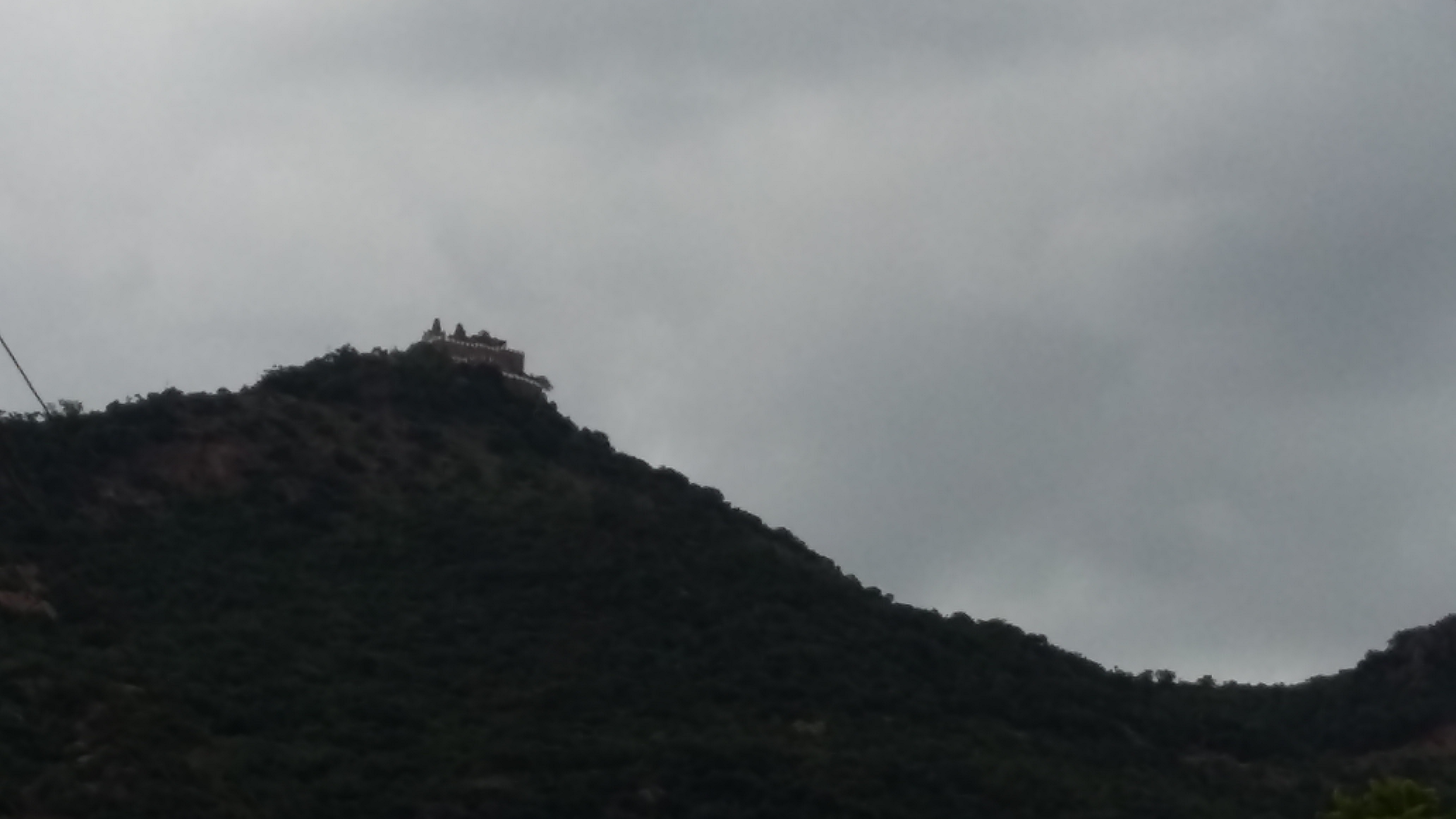 நைனாமலை உச்சியிருள்ள வரதராச பெருமாள் கோவில்